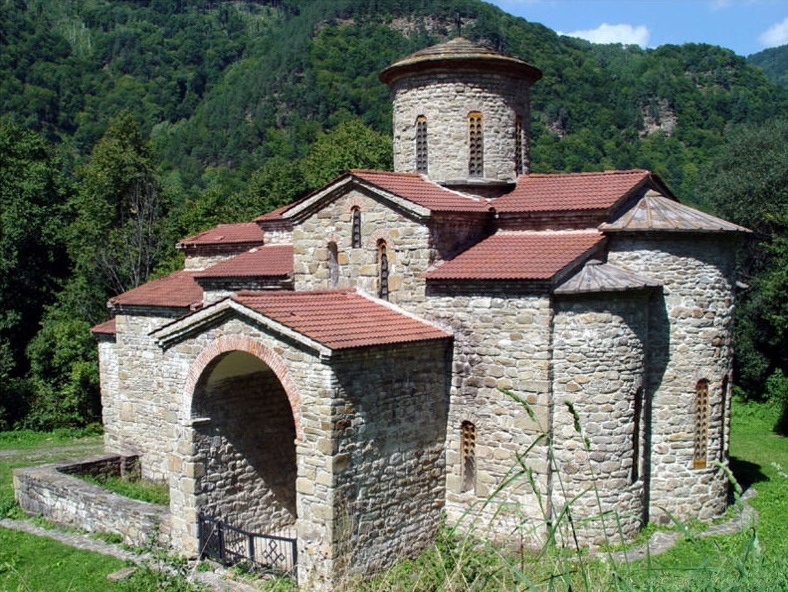 Северный Зеленчукский храм (Х в.) - Георгиевский кафедральный собор Аланской Епархии. Нижне-Архызский историко-архитектурный и археологический комплекс. Карачаево-Черкессия. Музей-заповедник. Снимок сделан с правой стороны.